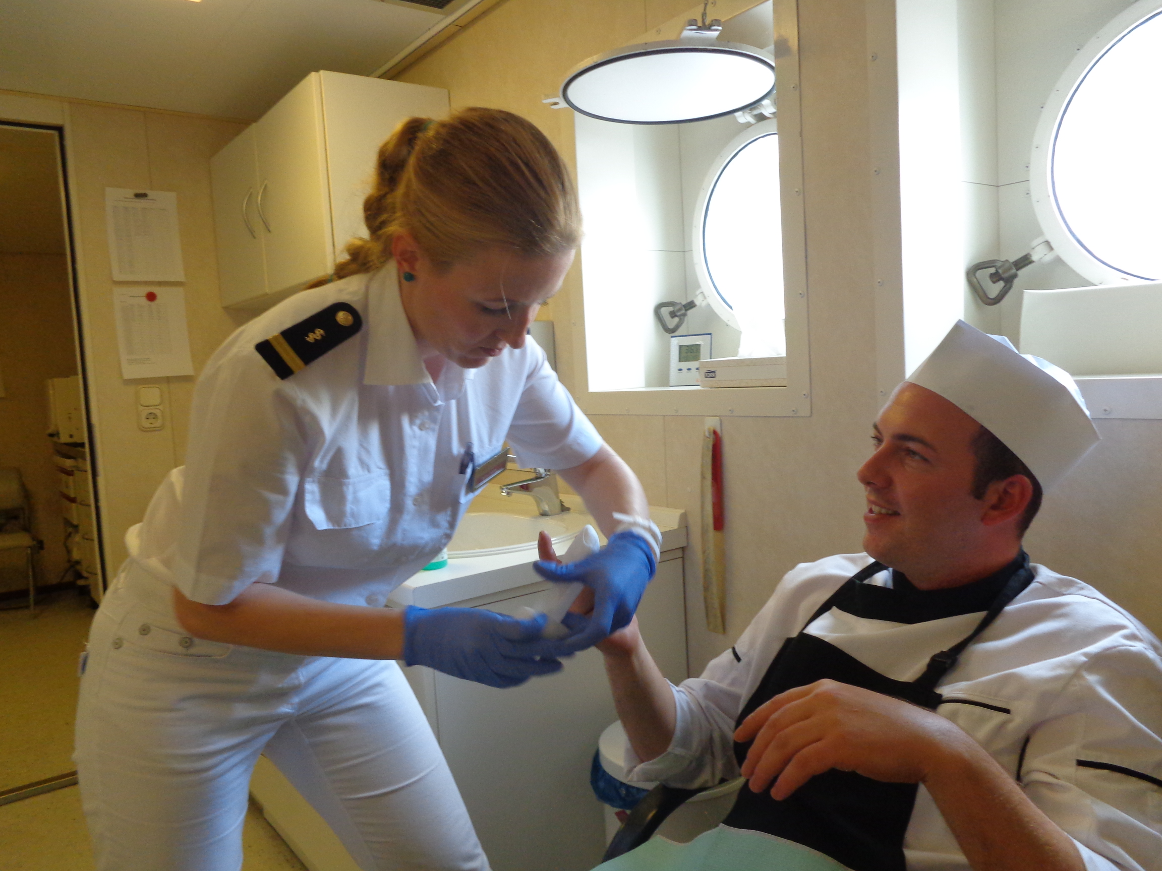 Krankenschwester der MS Deutschland bei der Anlage eines Fingerverbandes